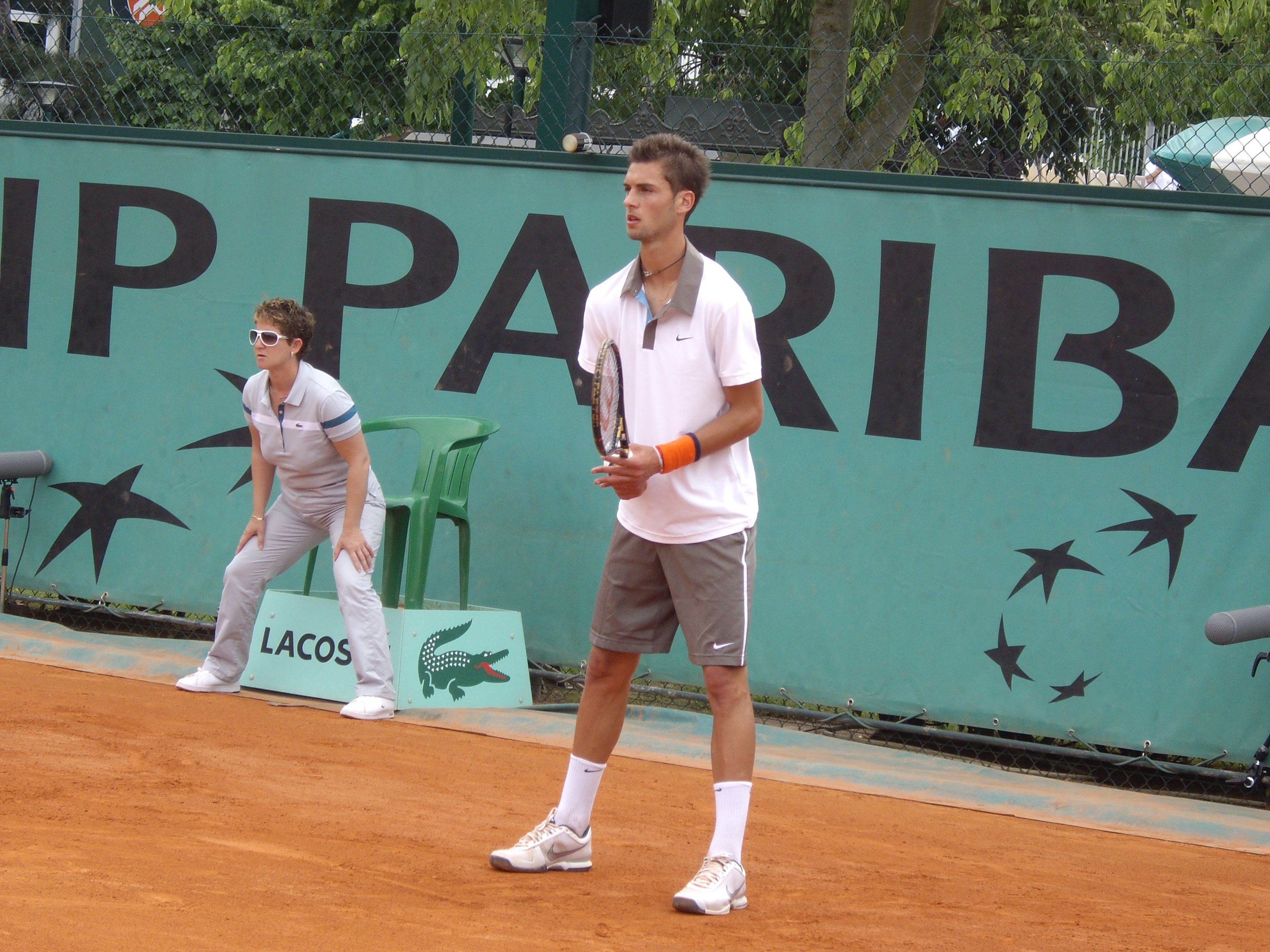 Beoit Paire lors de son 1er tour des qualifications de Roland Garros 2009